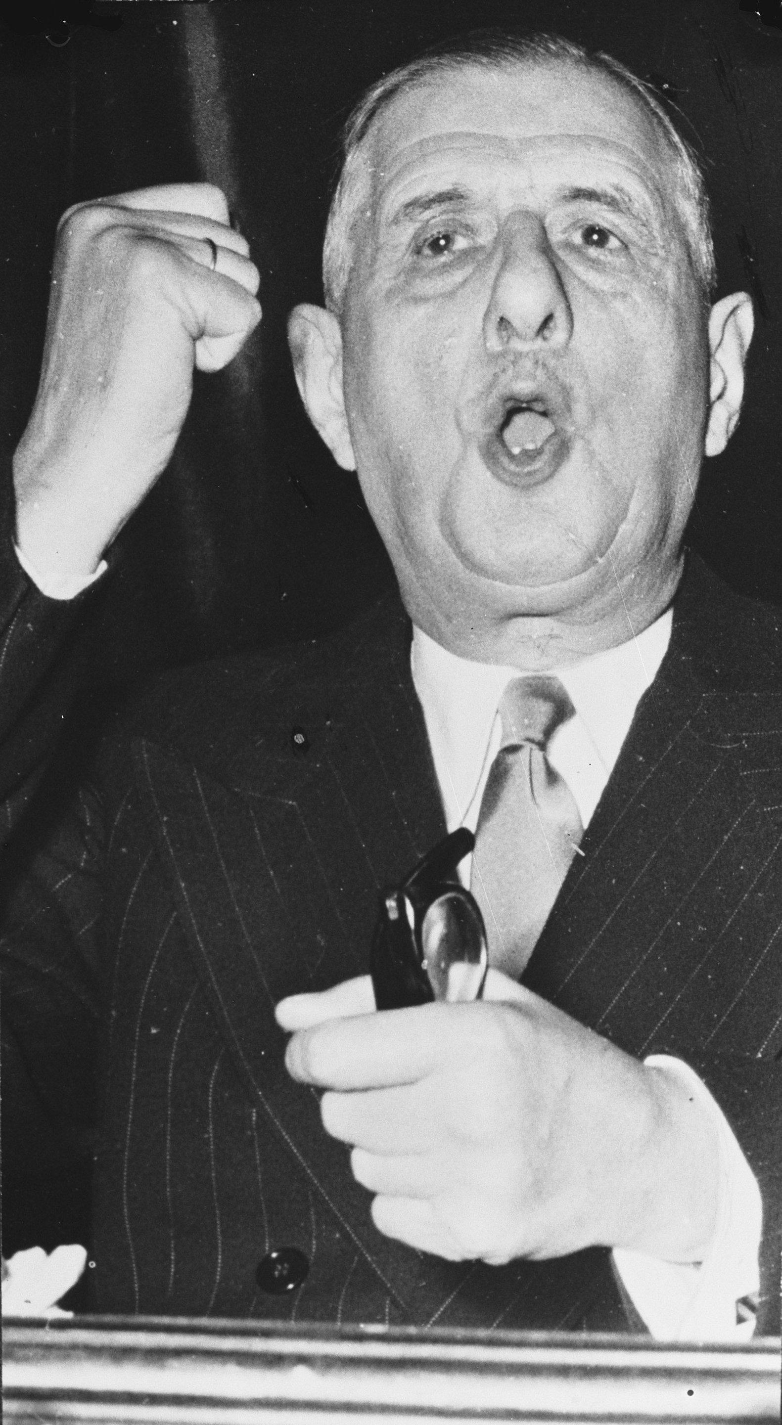 Collectie / Archief : Fotocollectie Anefo Reportage / Serie : [ onbekend ] Beschrijving : Generaal De Gaulle Datum : 16 mei 1958 Persoonsnaam : Gaulle, Charles de Fotograaf : Fotograaf Onbekend / Anefo Auteursrechthebbende : Nationaal Archief Materiaalsoort : Glasnegatief Nummer archiefinventaris : bekijk toegang 2.24.01.09 Bestanddeelnummer : 909-5671